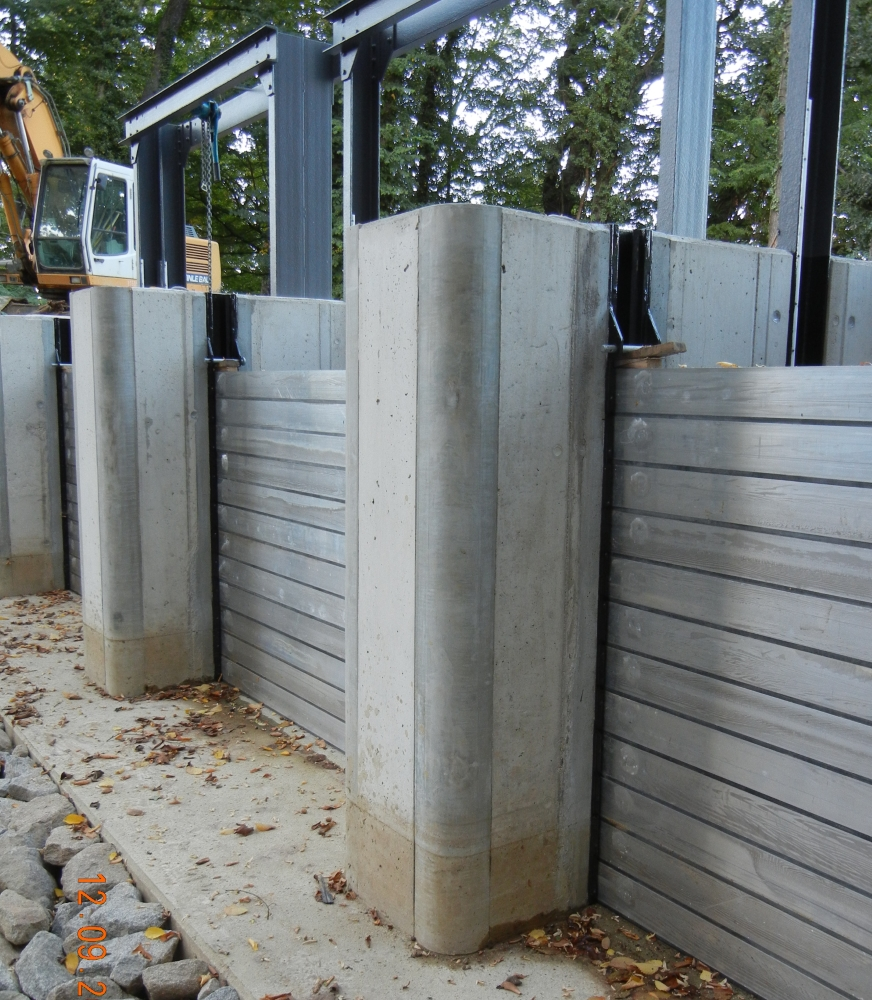 Zur Erhöhung der Widerstandsfähigkeit gegen Abrieb und Umweltbedingungen wurden UHPC-Fertigteile als Schutzverkleidung eingebaut.